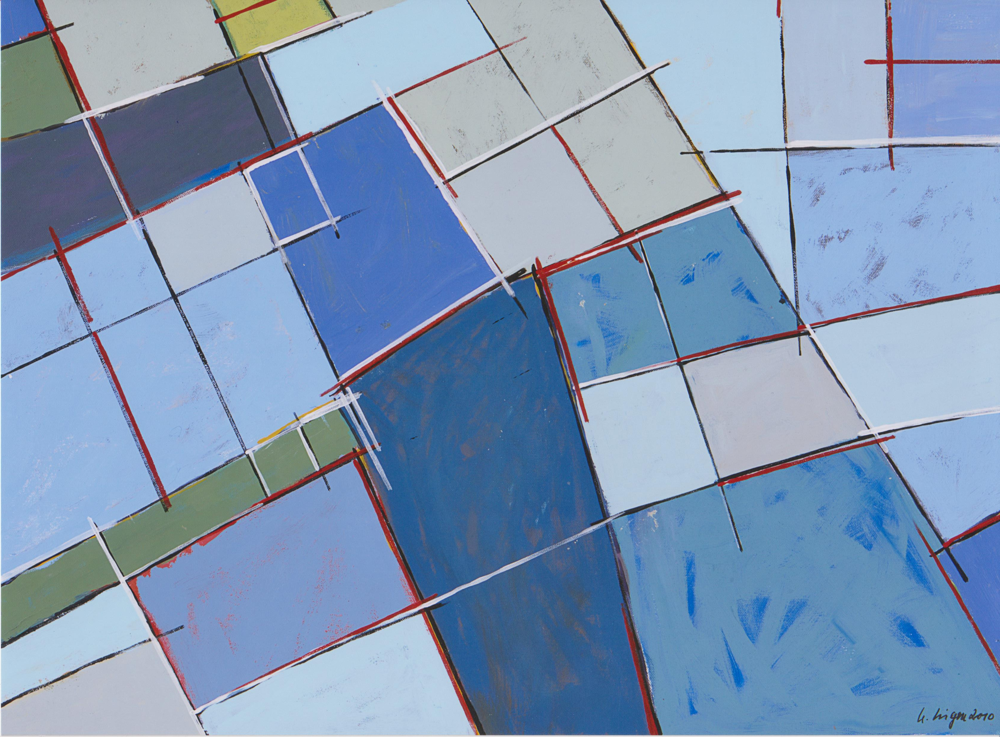 Dieter Sieger, Untitled, 2010